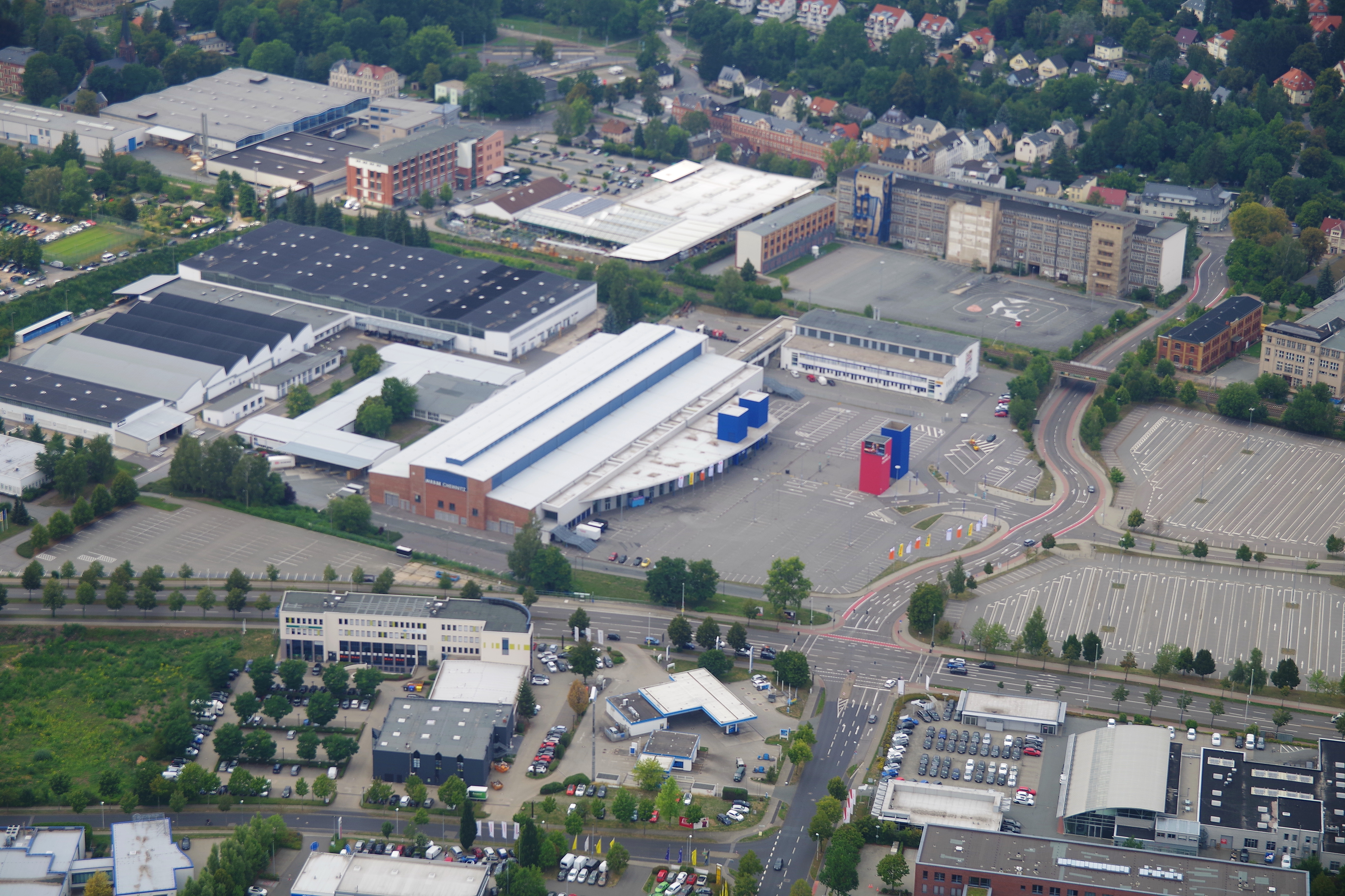 Messe Chemnitz / Chemnitz Arena / ehemalige Wanderer Werke